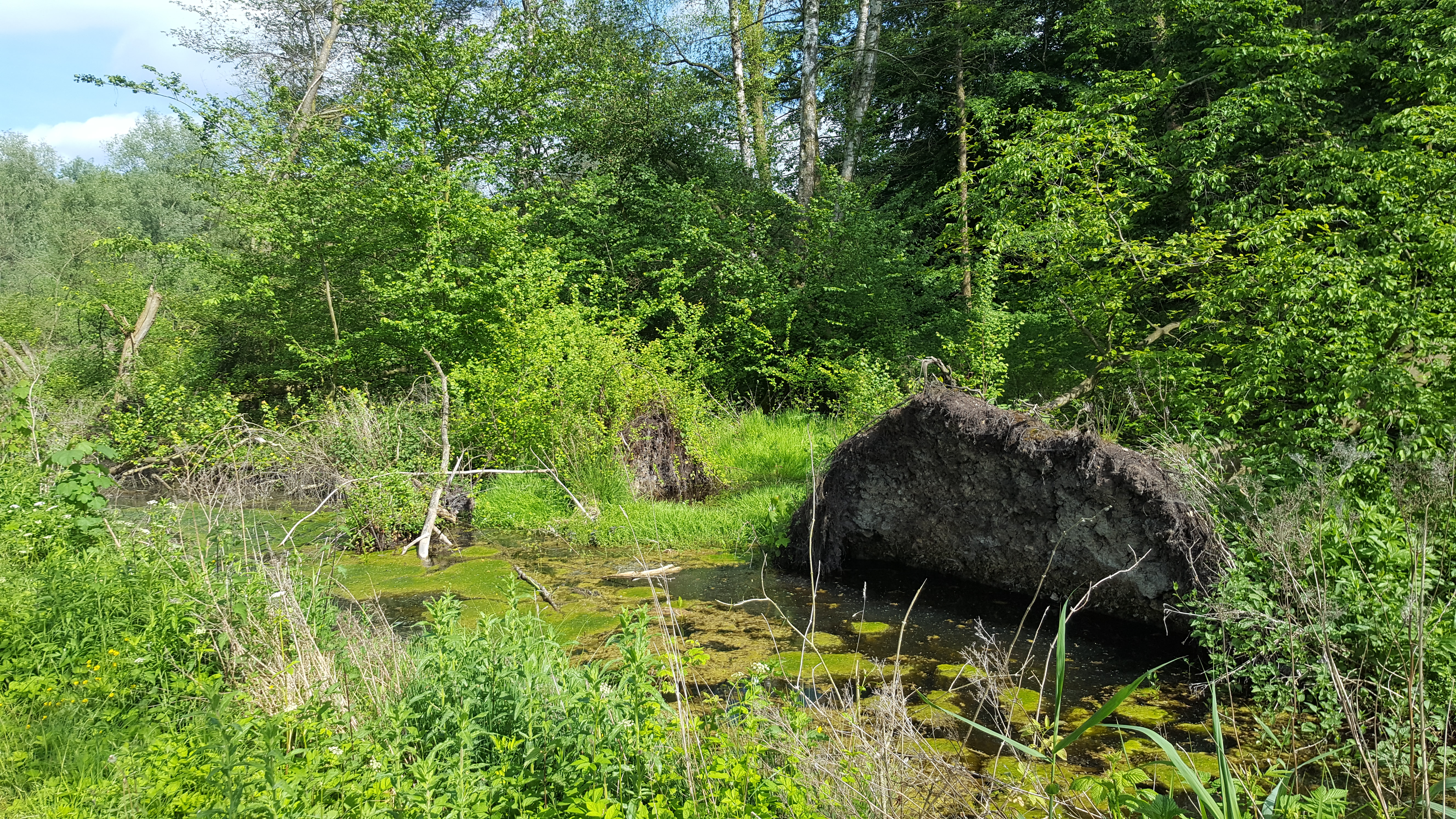 Ein umgestürzter Baum im Moorteich im Naturschutzgebiet „Muckenbruch“ in Bad Westernkotten